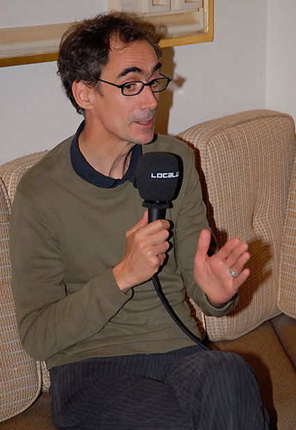 César Saratxu, actor español